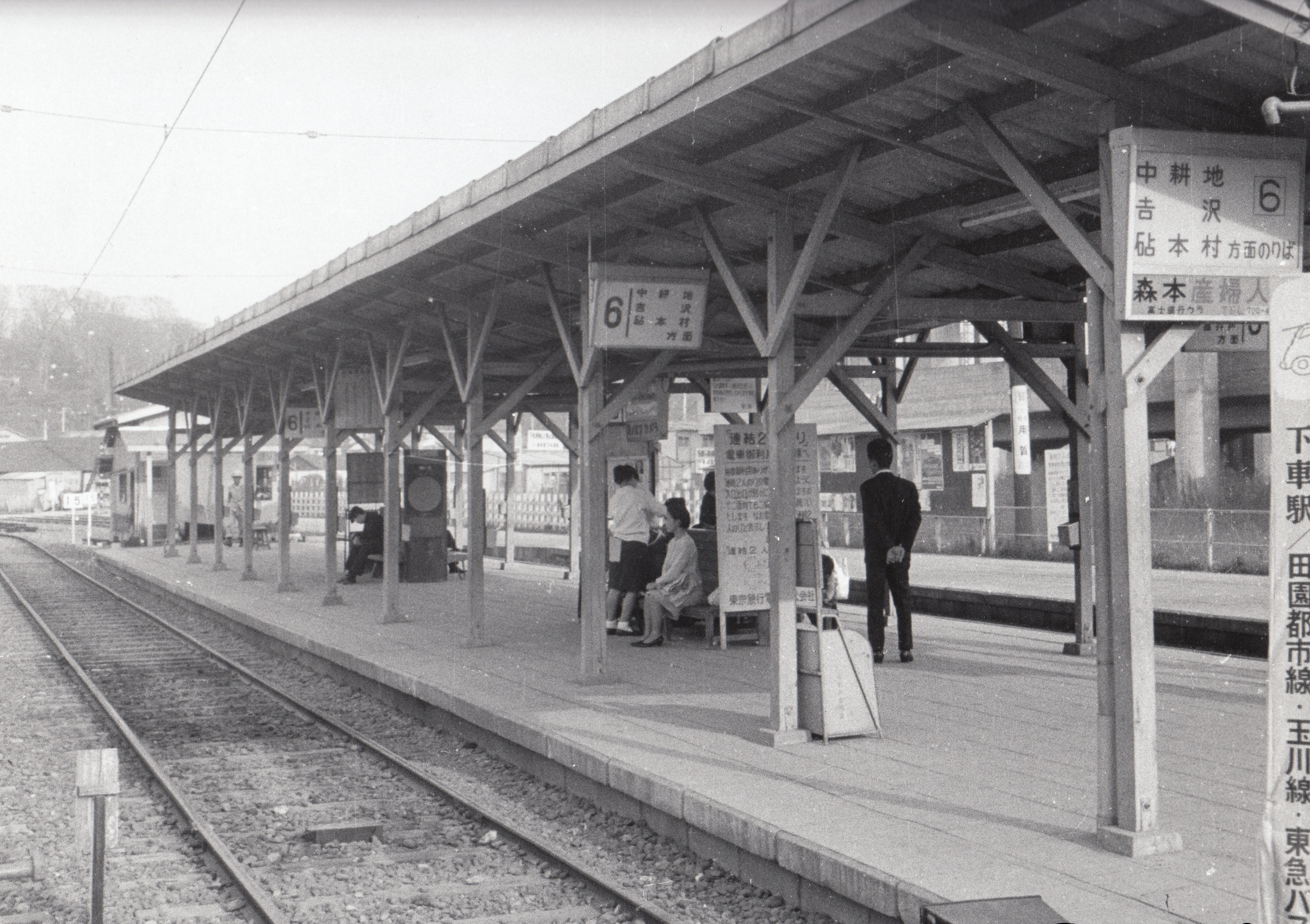 1968年の秋 二子玉川園駅砧線ホームにて。なお、砧線の廃線は翌年1969年（写真撮影者：大勝庵・玉電と郷土の歴史館 大塚勝利）